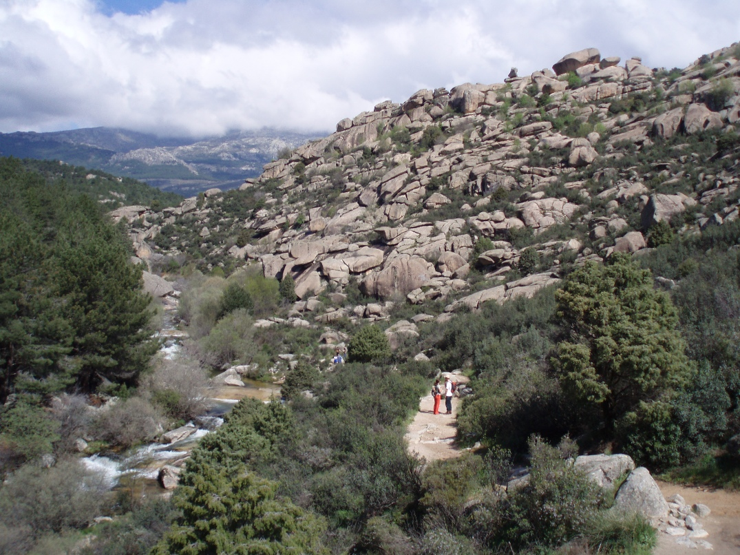 Zona baja de la Pedriza Anterior (Comunidad de Madrid, España).